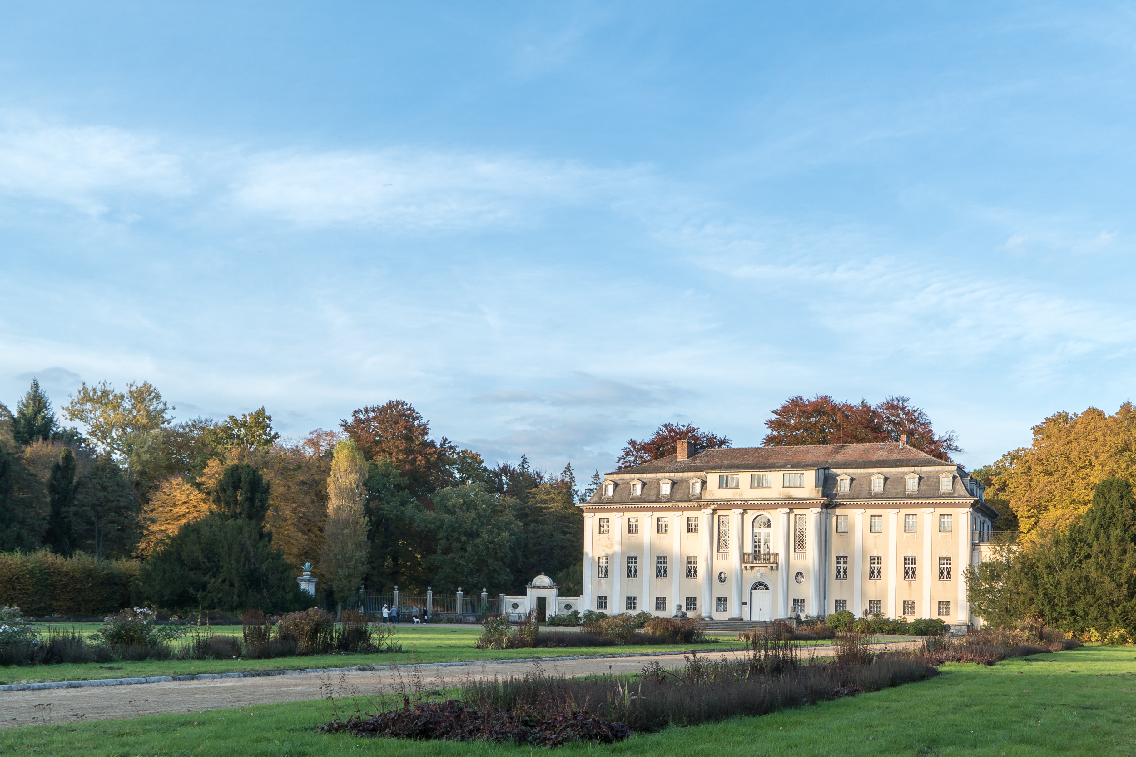 Neues Schloss im Stadtpark von Tangerhütte